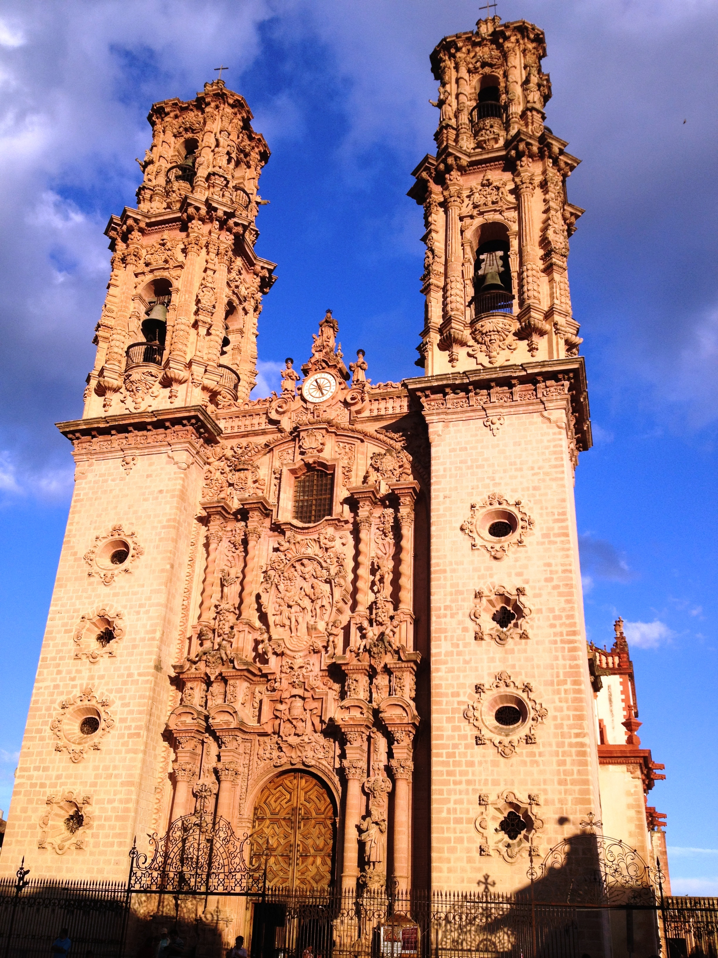 Fachada de Santa Prisca en Taxco de Alarcon